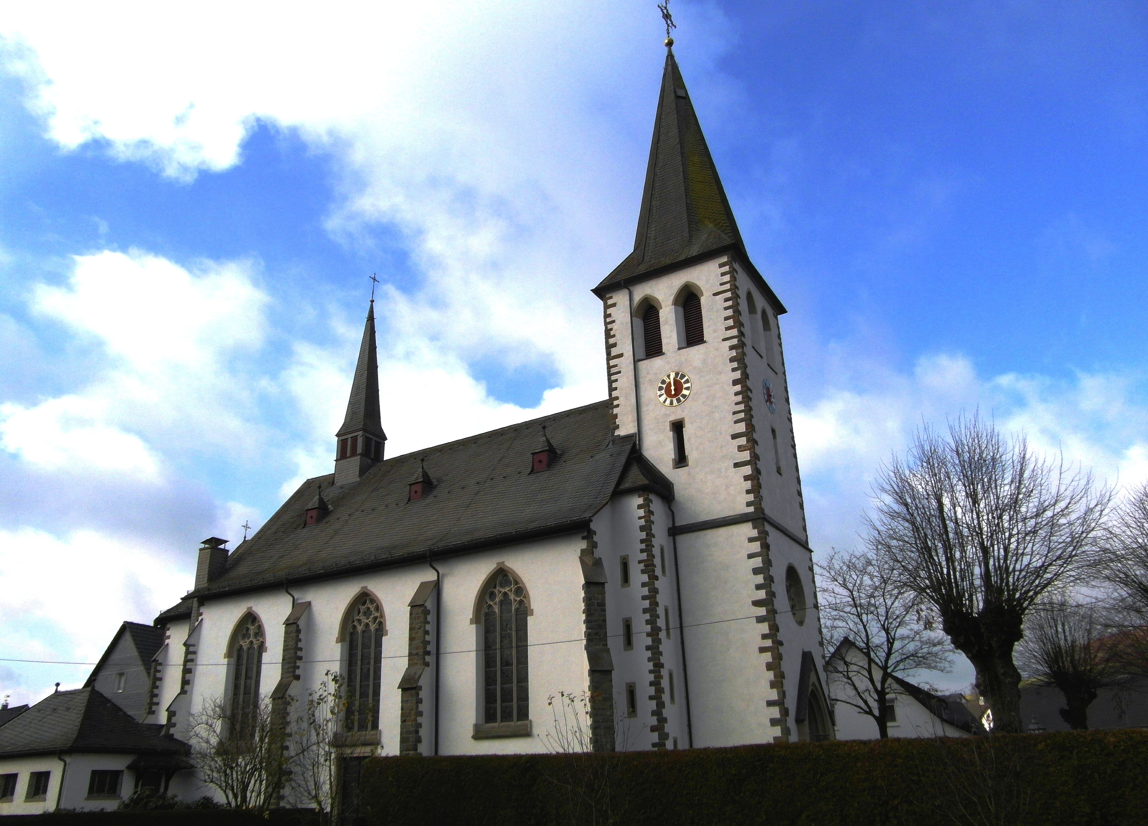 St. Antonius Einsiedler - denkmalgeschütztes Bauwerk